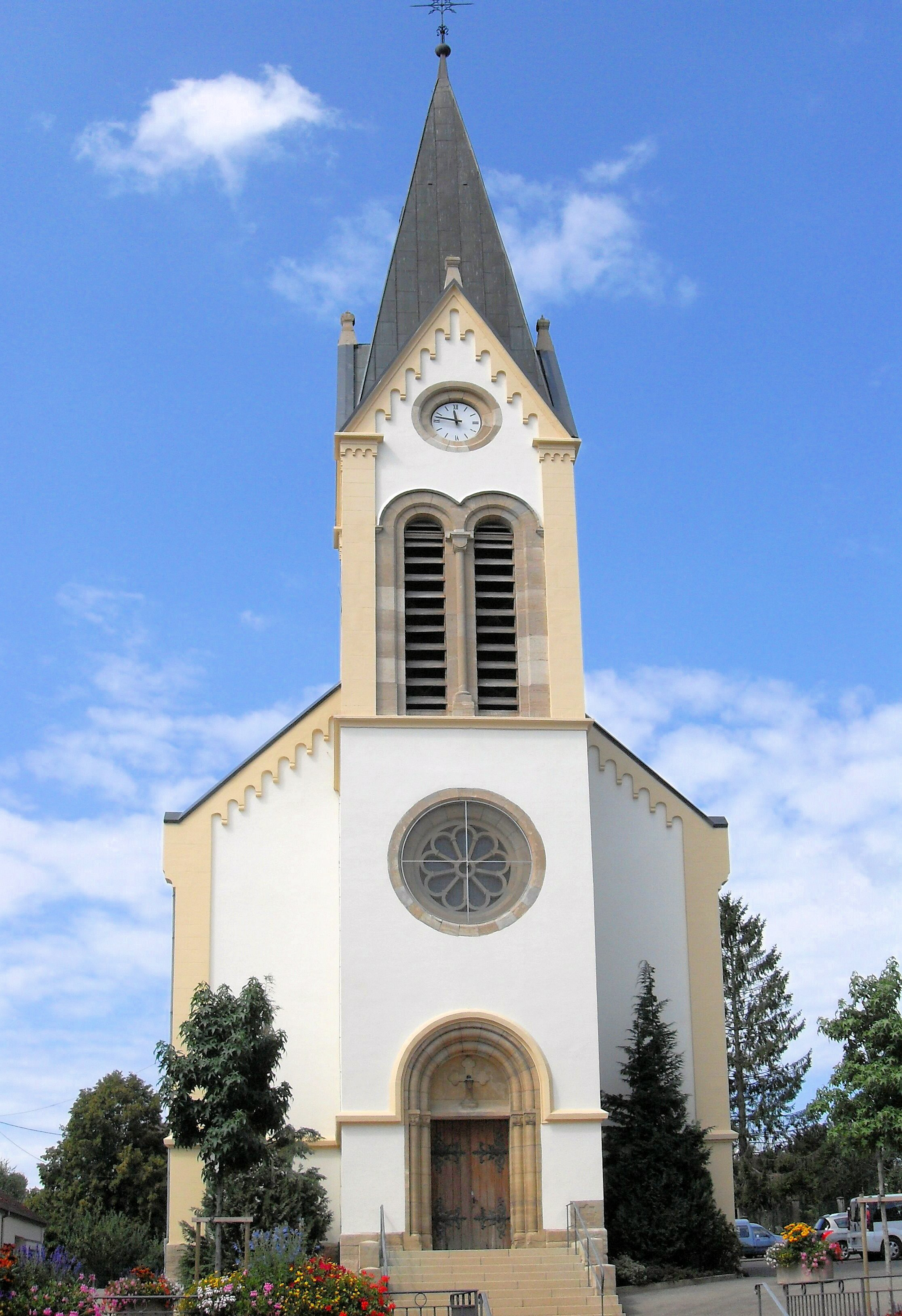 L'église Saint-Valentin d'Attenschwiller